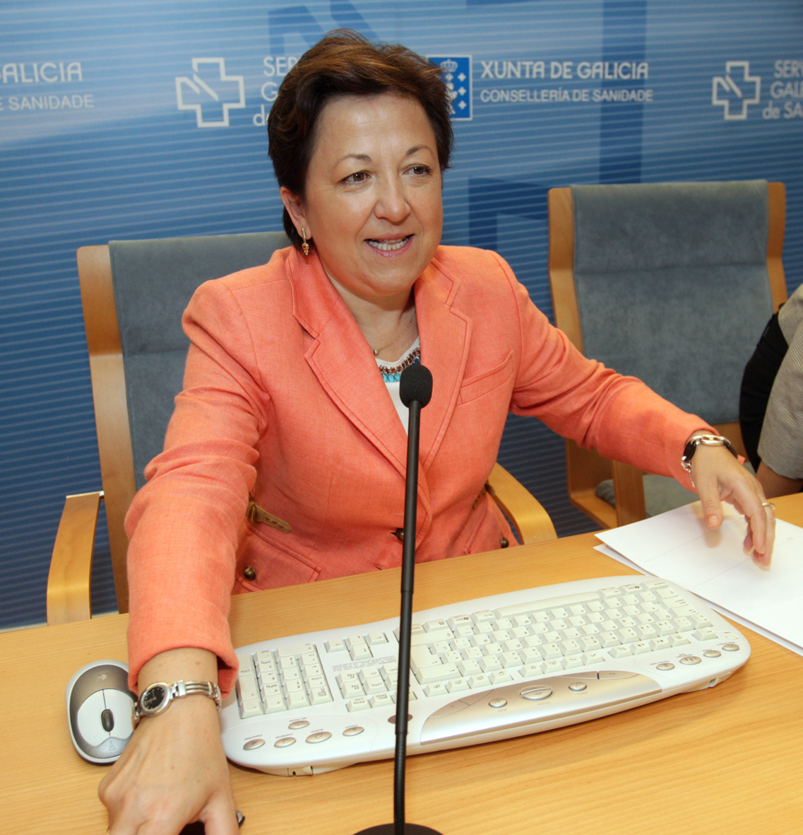 Pilar Farjas, directora xeral de Saúde Pública